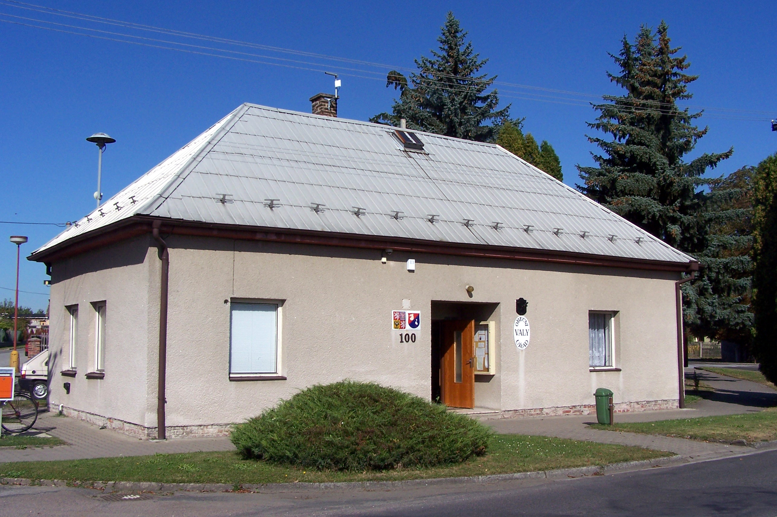 Valy nad Labem - Obecní úřad. Veselská ulice.